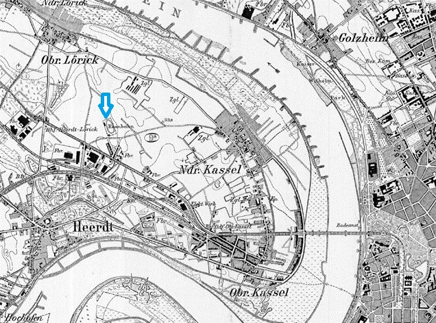 Stadtplan Düsseldorf mit Lage der ehem. Radrennbahn (1907 bis 1937)